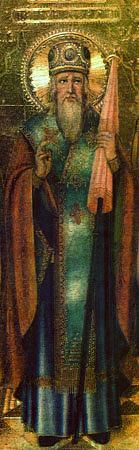 saint Gyrii of Kazan